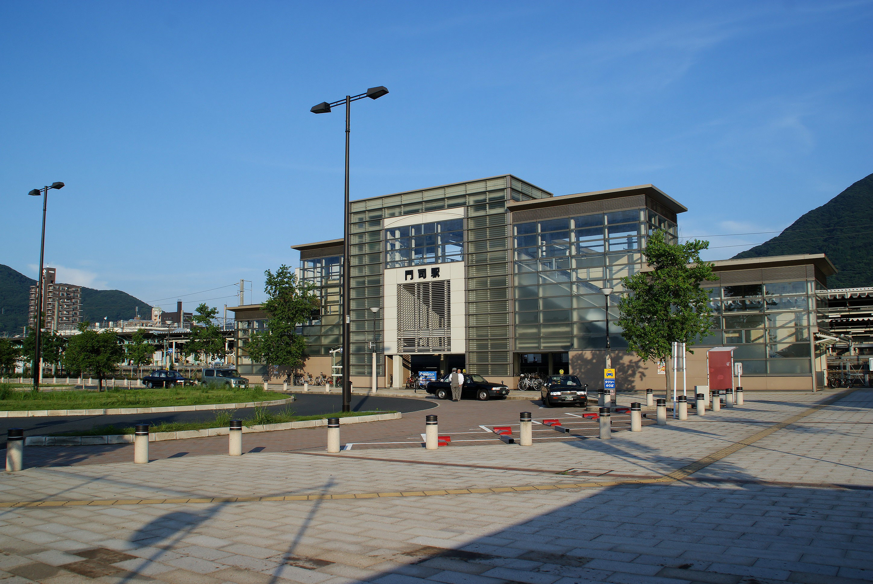 Kyushu Railway, Moji Station.(Moji Ward, Kitakyushu City, Fukuoka Prefecture, Japan)